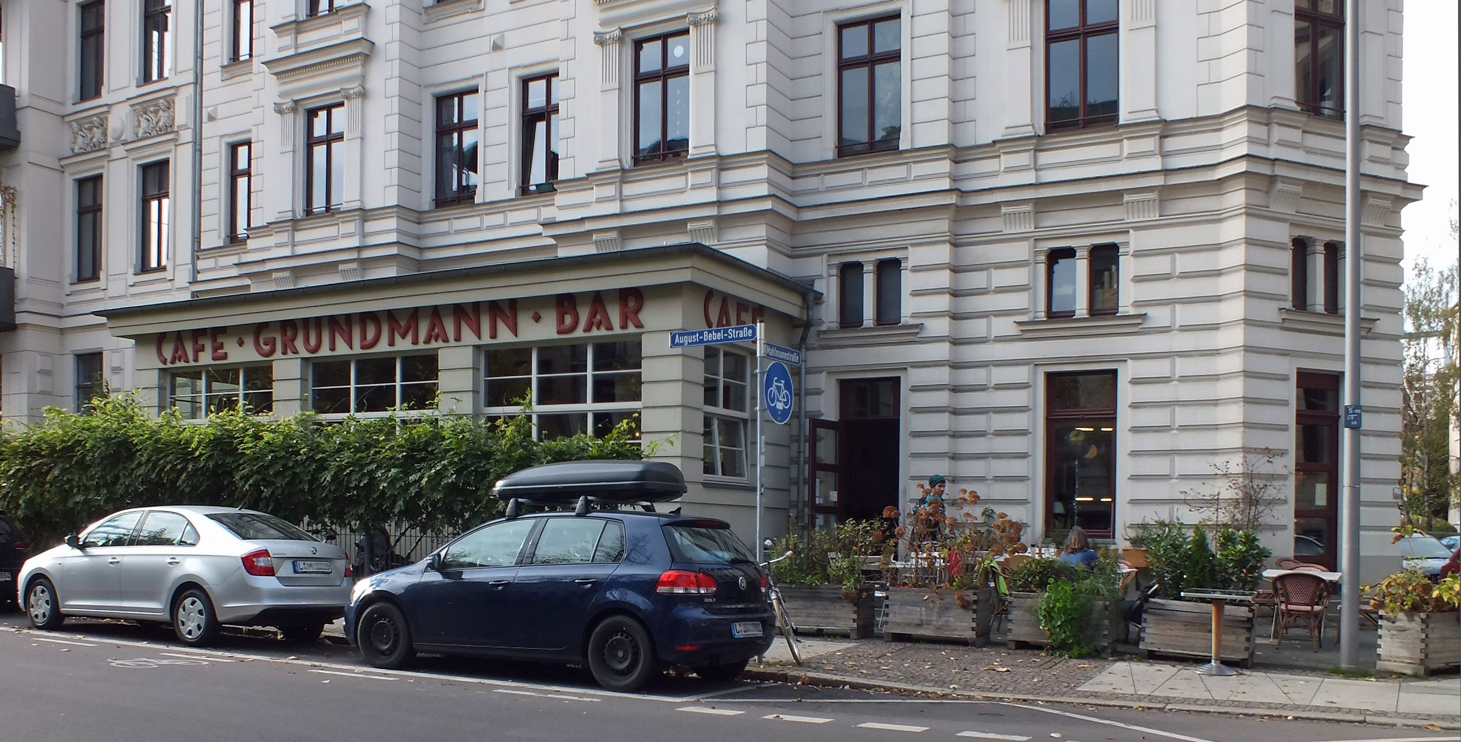 Café Grundmann in Leipzig